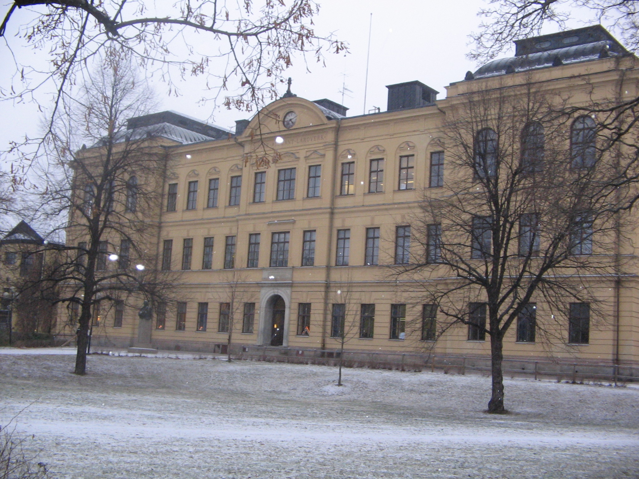 Kristinegymnasiet i Falun. Bild tagen 2006 av mig själv. Photograph taken by me